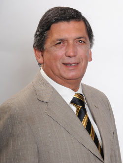 Lautaro Carmona Soto, diputado chileno.